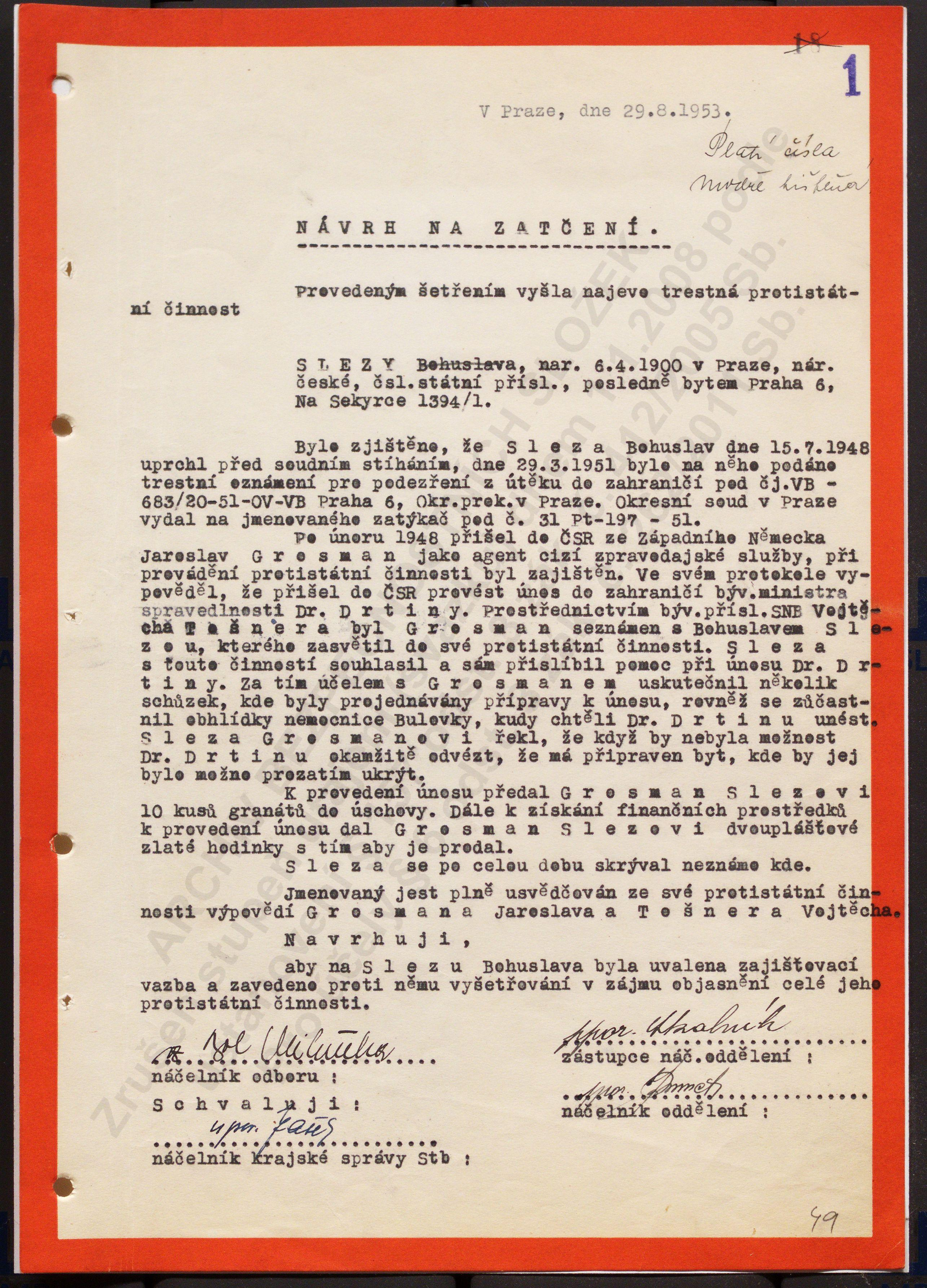 33. Návrh na zatčení Slezy